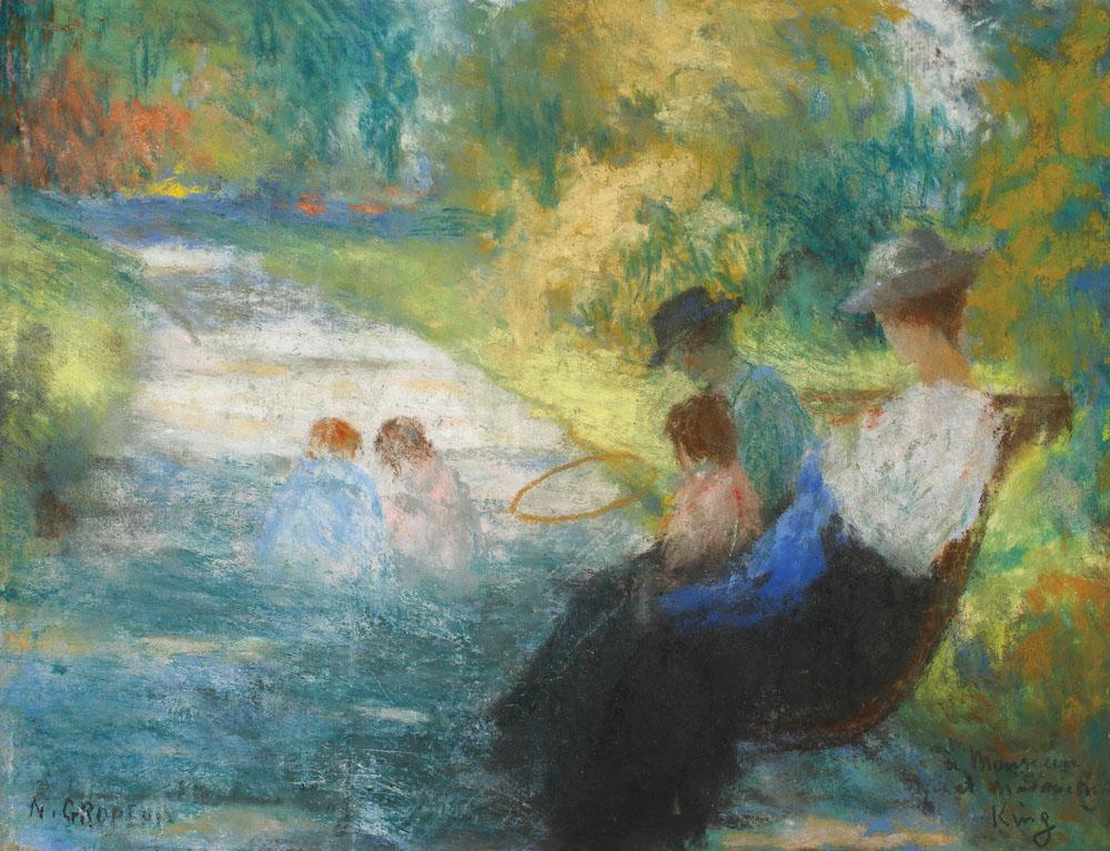 Nicolae Gropeanu - Scenă de duminică, pastel pe carton, 23,5 x 30,5 cm, semnat stânga jos, dedicat dreapta jos, cu negru, N. GROPEANU, a monseur a madame King.